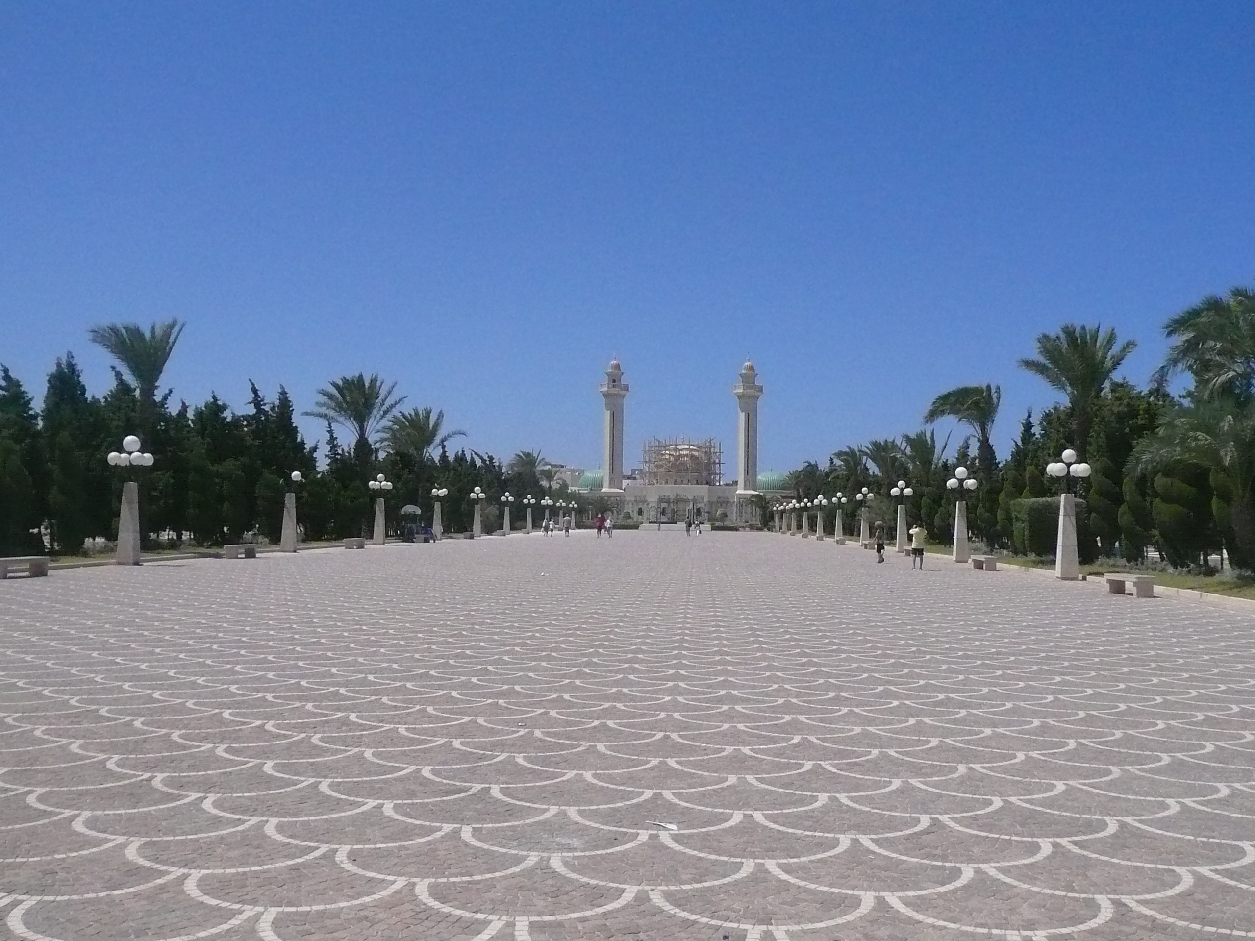 Bourguibas Mausoleum in der Totale